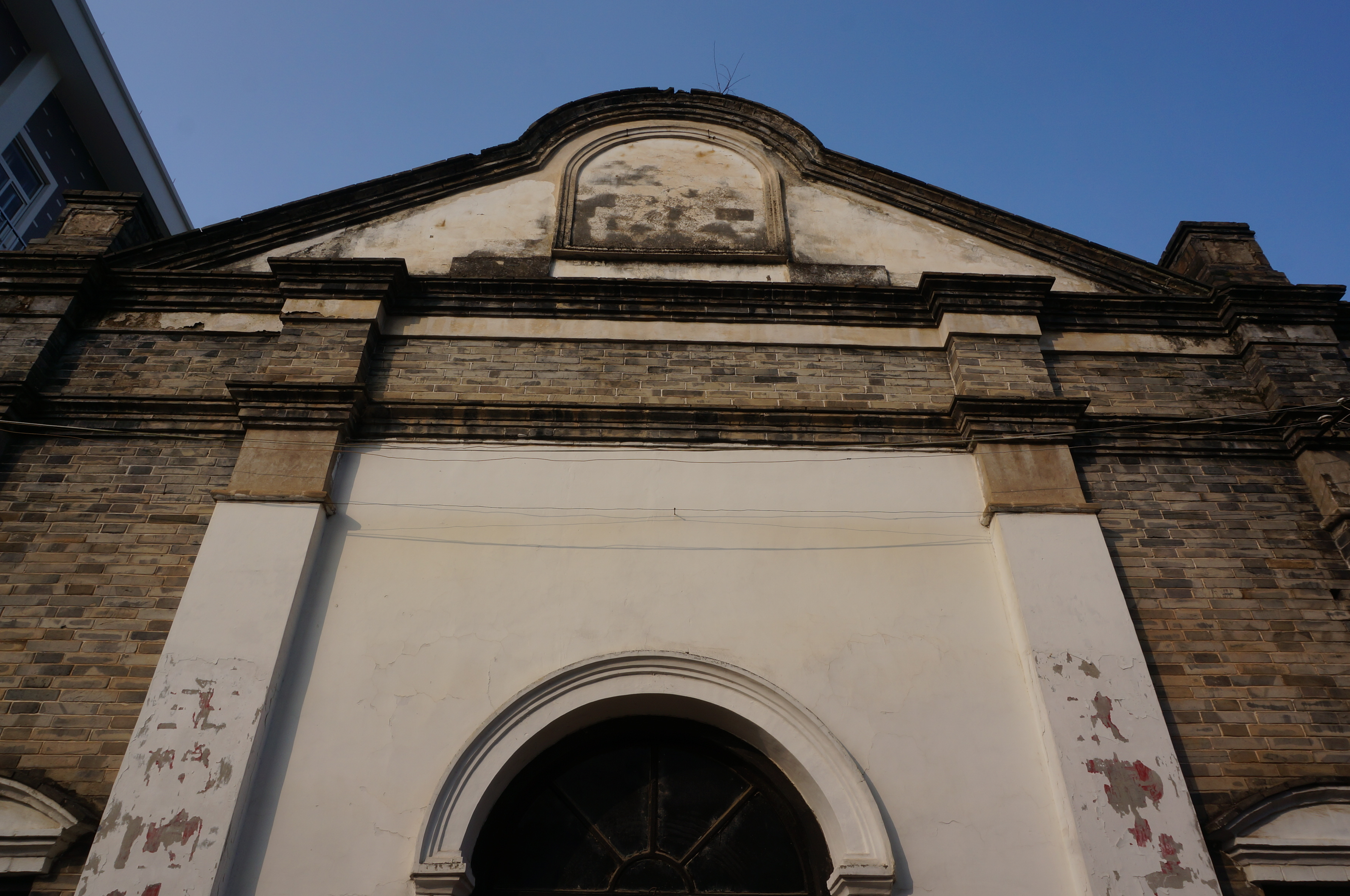 松阳天主教堂，圣堂南侧，仰视。